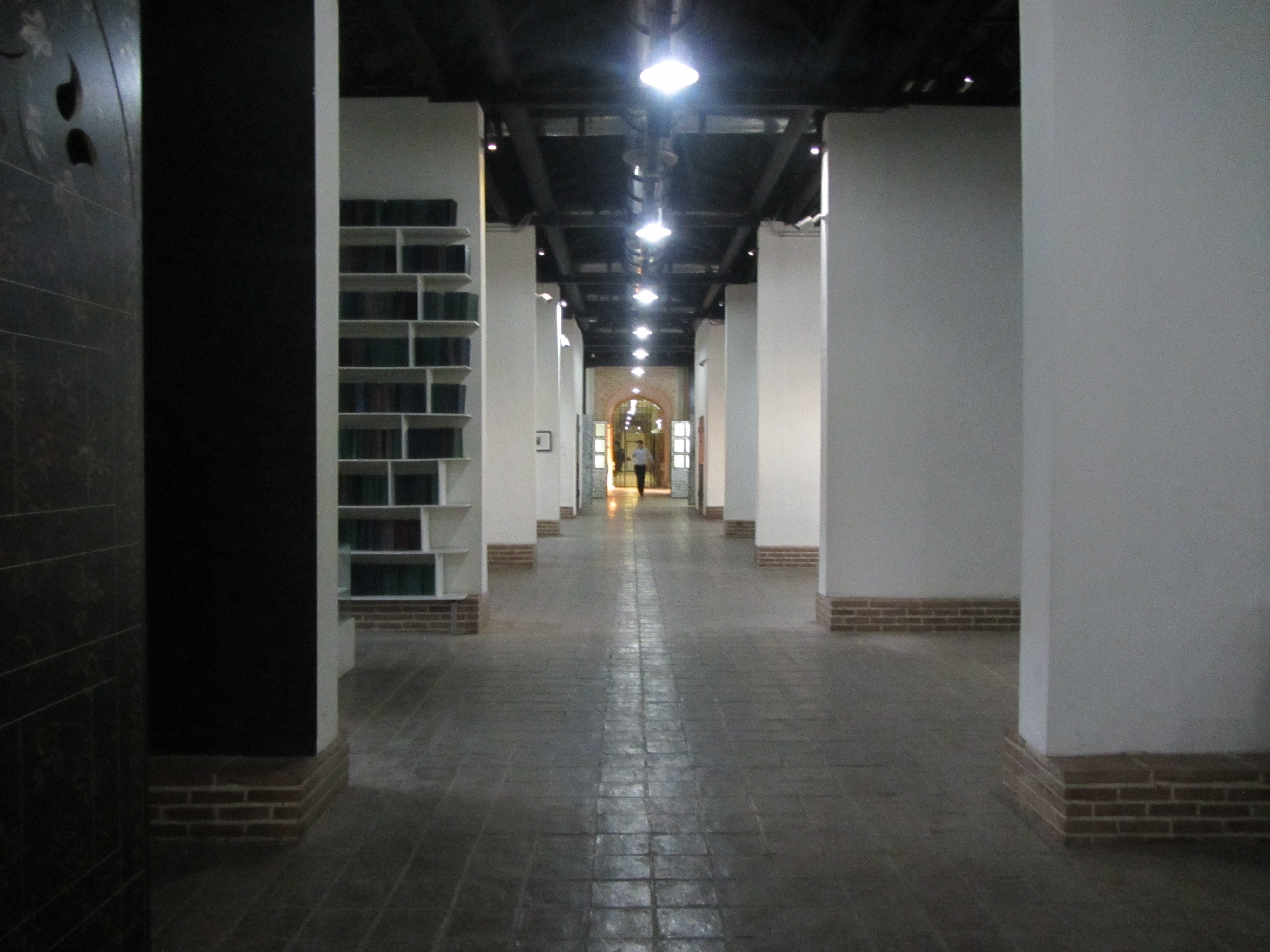 زندان قصر یا باغ‌موزه قصر